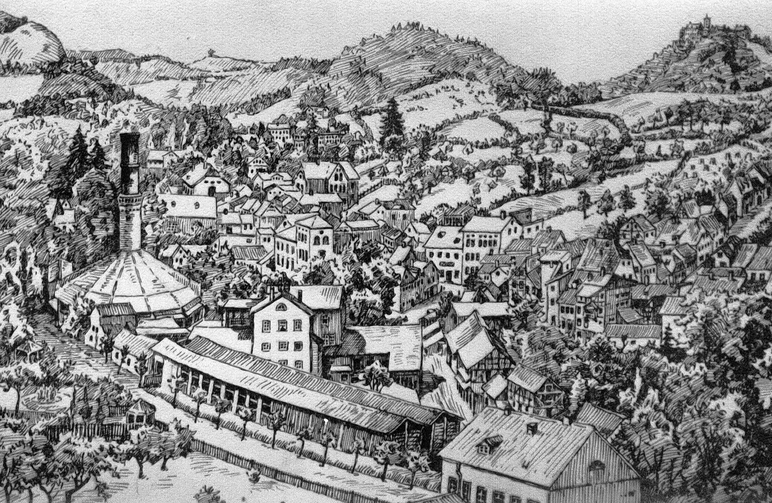 Die Eisenacher Ziegelei Sältzer zwischen Karthäuserstraße und Marienstraße in Eisenach. Kupferstich 1875.